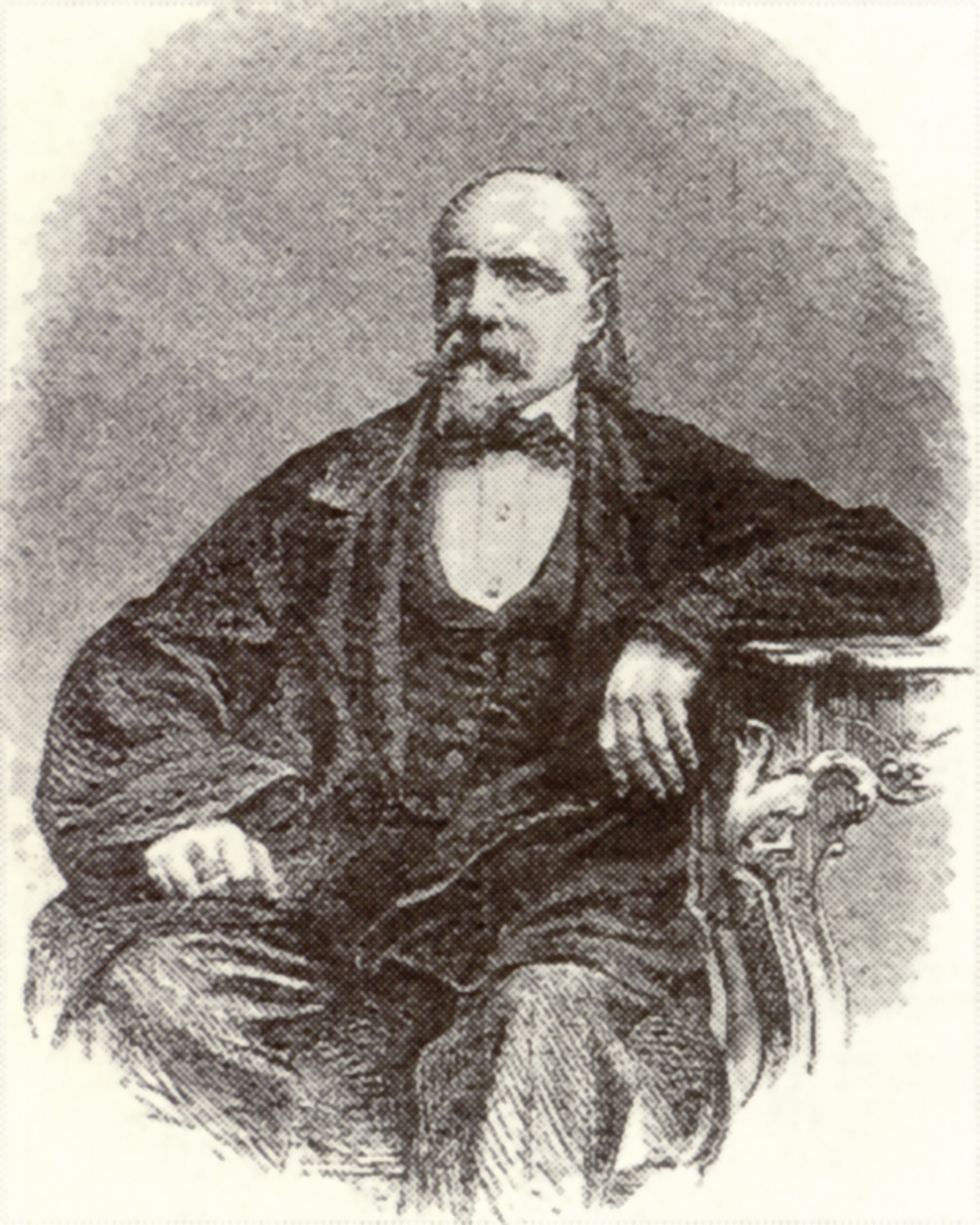 Albert Camesina (1806-1881), Lithographie